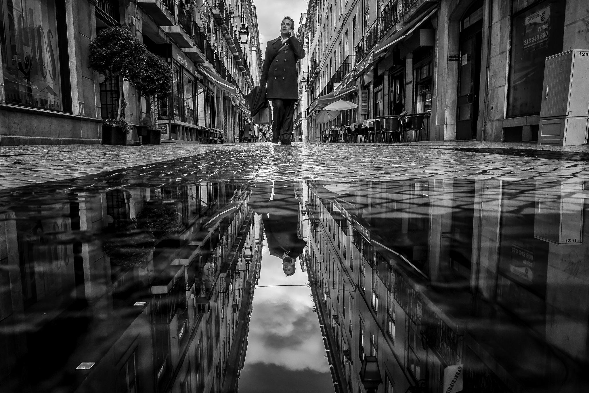 Фотограф Даниель Антунеш